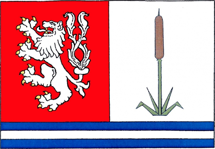 Vlajka, Rohozná, okres Svitavy